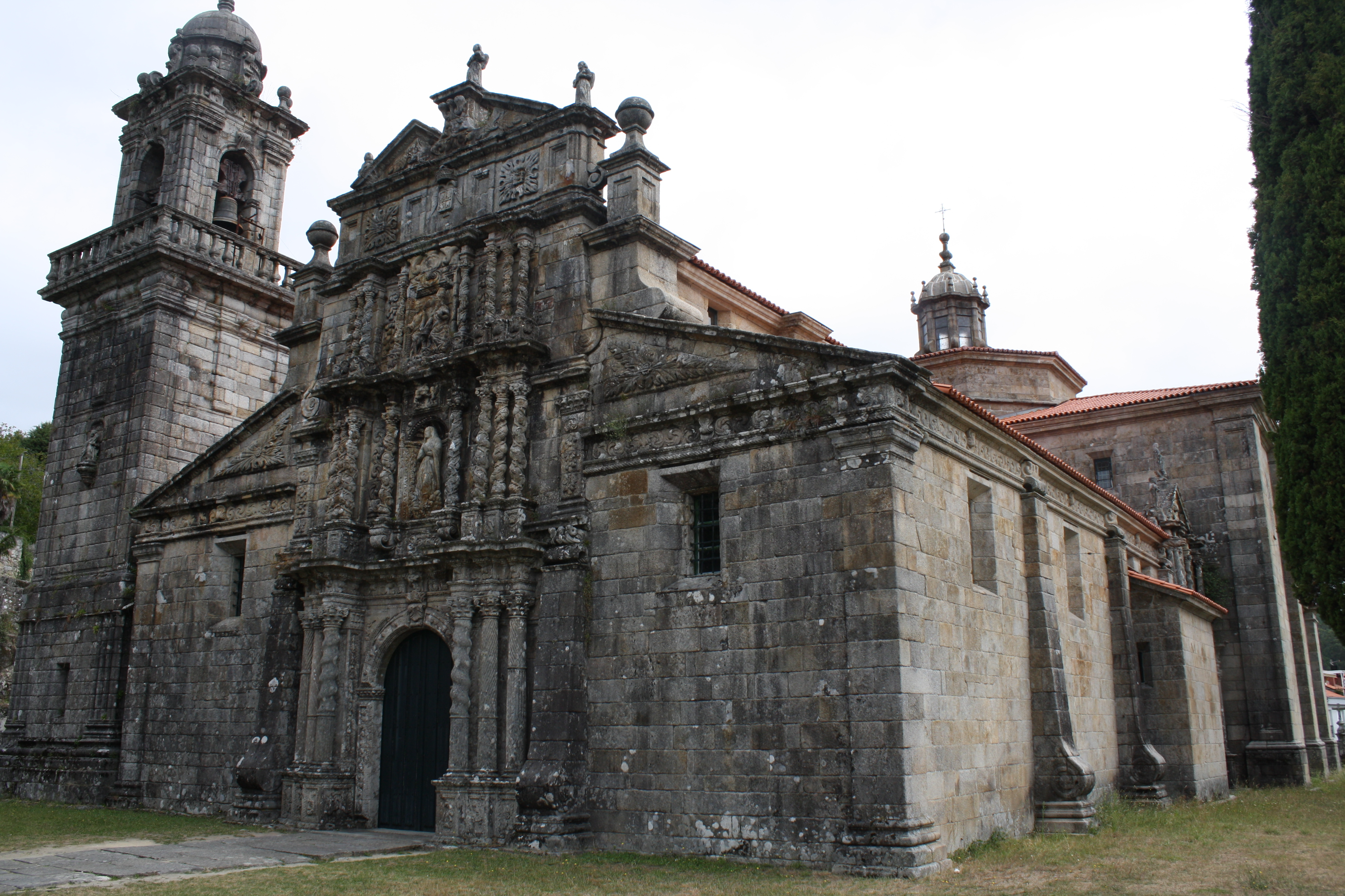 Iglesia de Santa María la Real de Entrimo